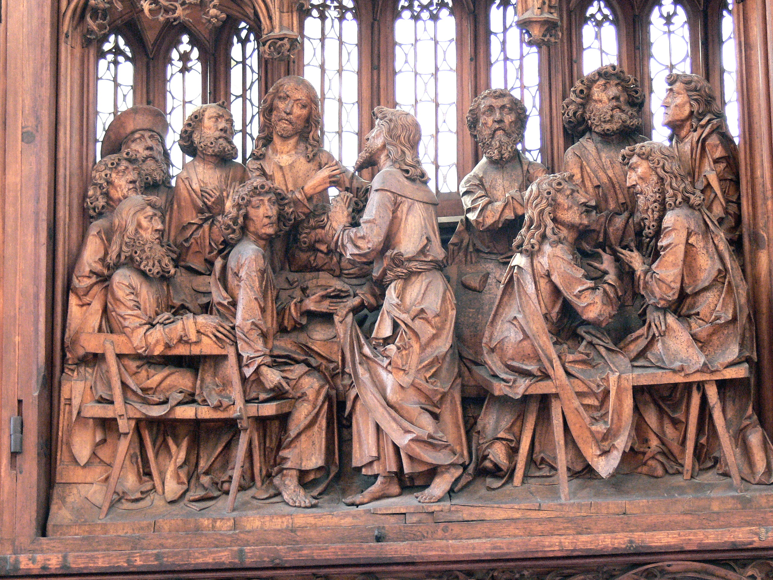 Heilig-Blut-Altar in St.Jakob in Rothenburg. Letztes Abendmahl